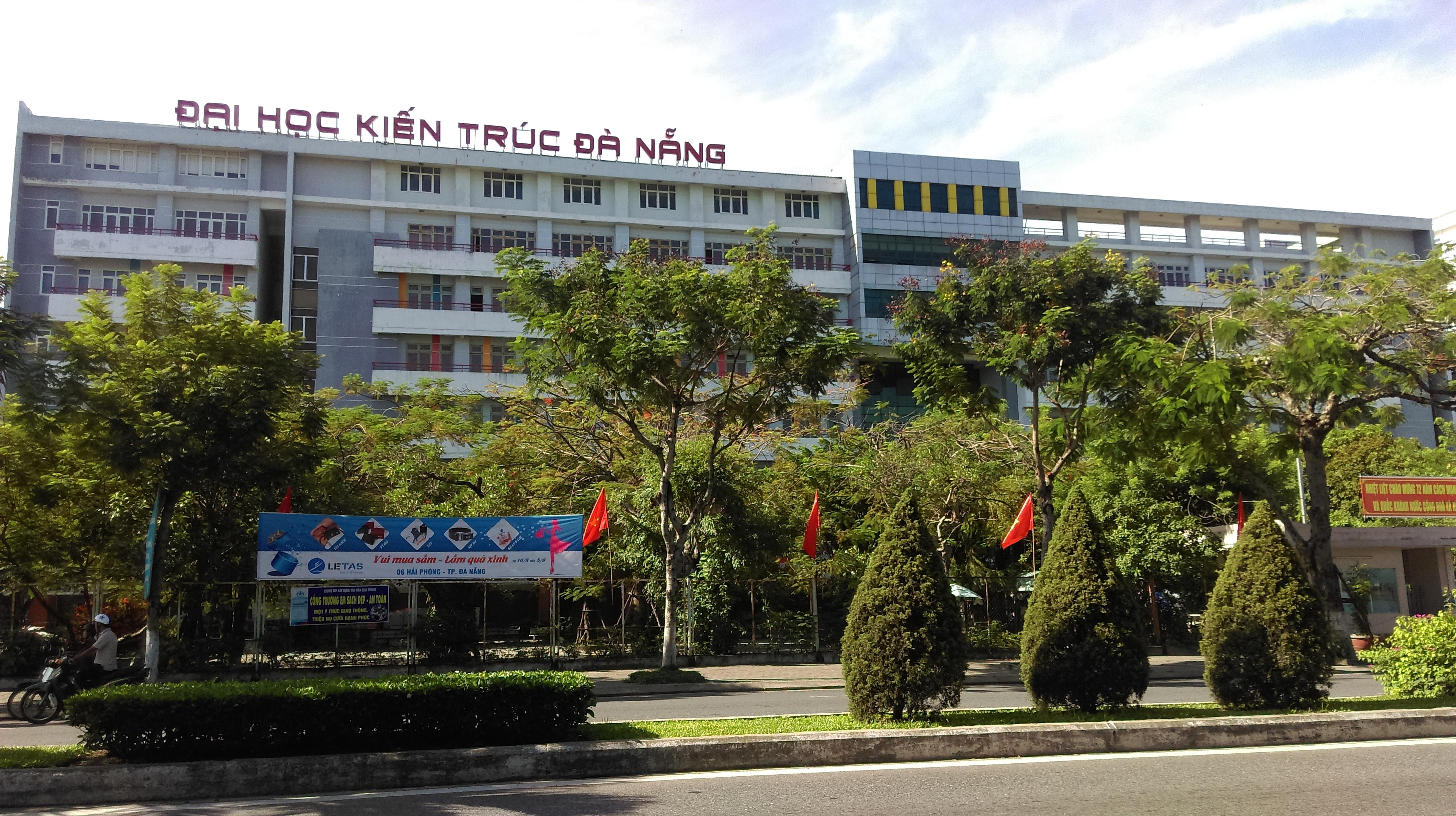 Đại học Kiến trúc Đà Nẵng